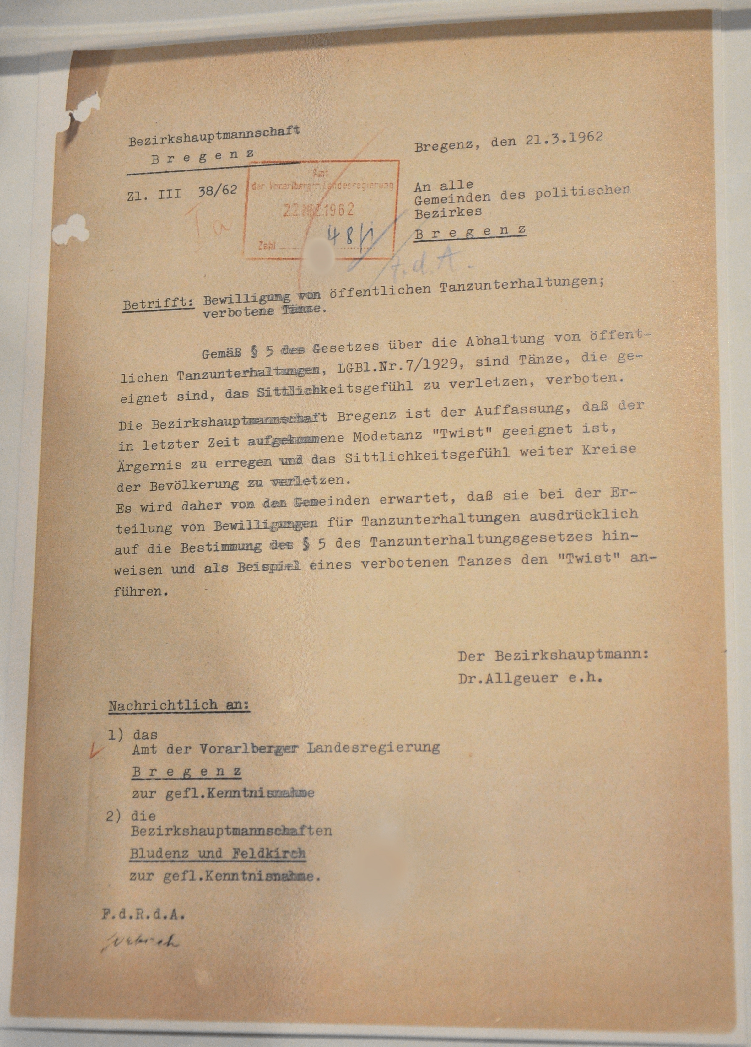 Bregenz, Vorarlberg Museum, Rundschreiben des Bregenzer Bezirkshauptmanns Anton Allgeuer an die Gemeinden vom 21. März 1962, enthaltend ein Twist-Verbot: … Die Bezirkshauptmannschaft Bregenz ist der Auffassung, daß der in letzter Zeit aufgekommene Modetanz "Twist" geeignet ist, Ärgernis zu erregen und das Sittlichkeitsgefühl weiter Kreise der Bevölkerung zu verletzen. Es wird daher von den Gemeinden erwartet, daß sie bei der Erteilung von Bewilligungen von Tanzunterhaltungen ausdrücklich auf die Bestimmung des §5 des Tanzunterhaltungsgesetzes hinweisen und als Beispiel eines verbotenen Tanzes den "Twist" anführen. vorarlberg museum Native namevorarlberg museumLocationBregenz, Vorarlberg, AustriaCoordinates47° 30′ 16″ N, 9° 44′ 48″ E Established1857WebsiteVorarlberg Museum website